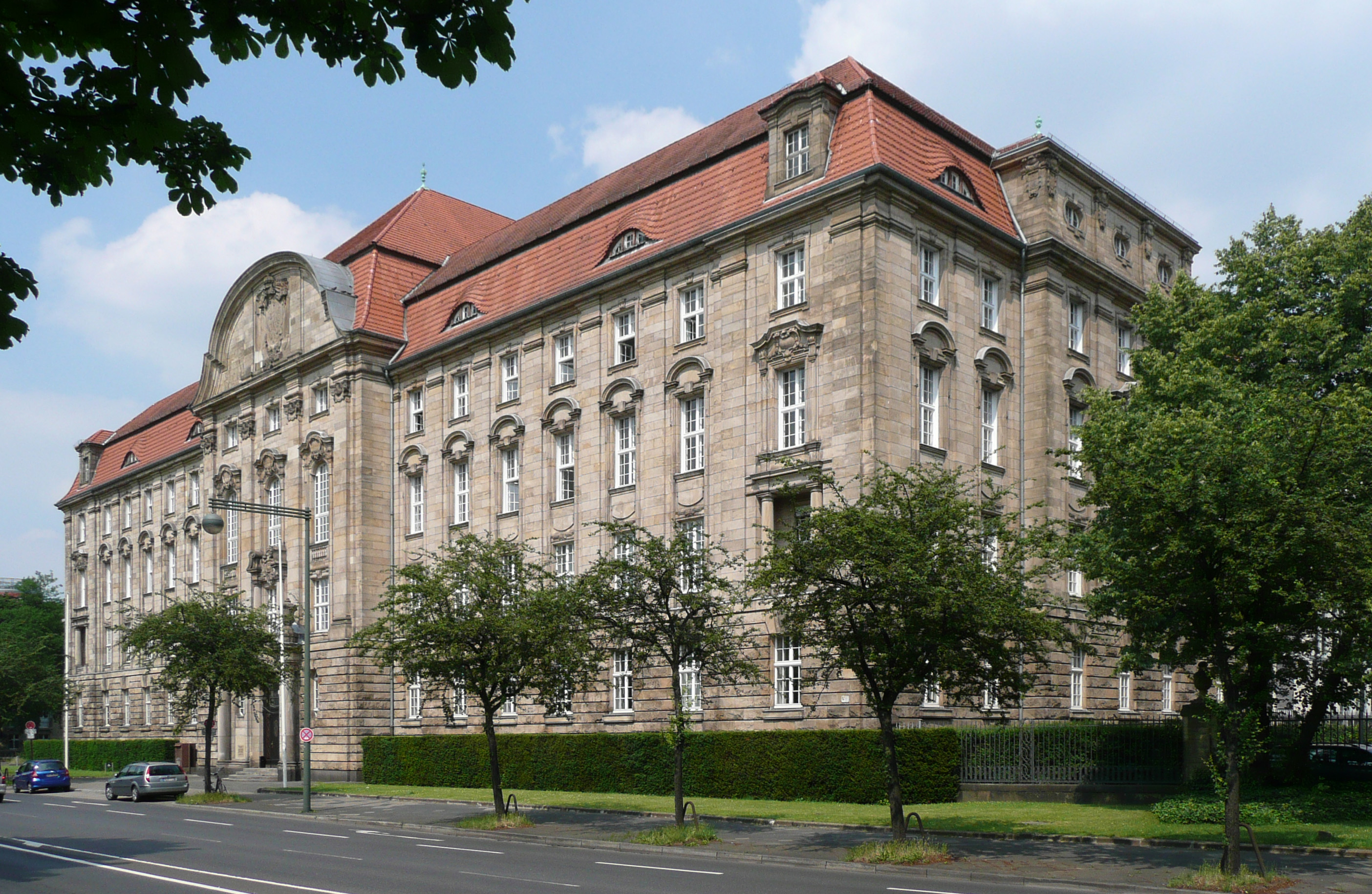 Hauptgebäude des Oberlandesgerichts Düsseldorf; Düsseldorf-Pempelfort, Cecilienallee 3 / Klever Straße; erbaut 1908-1910, seit 1984 unter Denkmalschutz